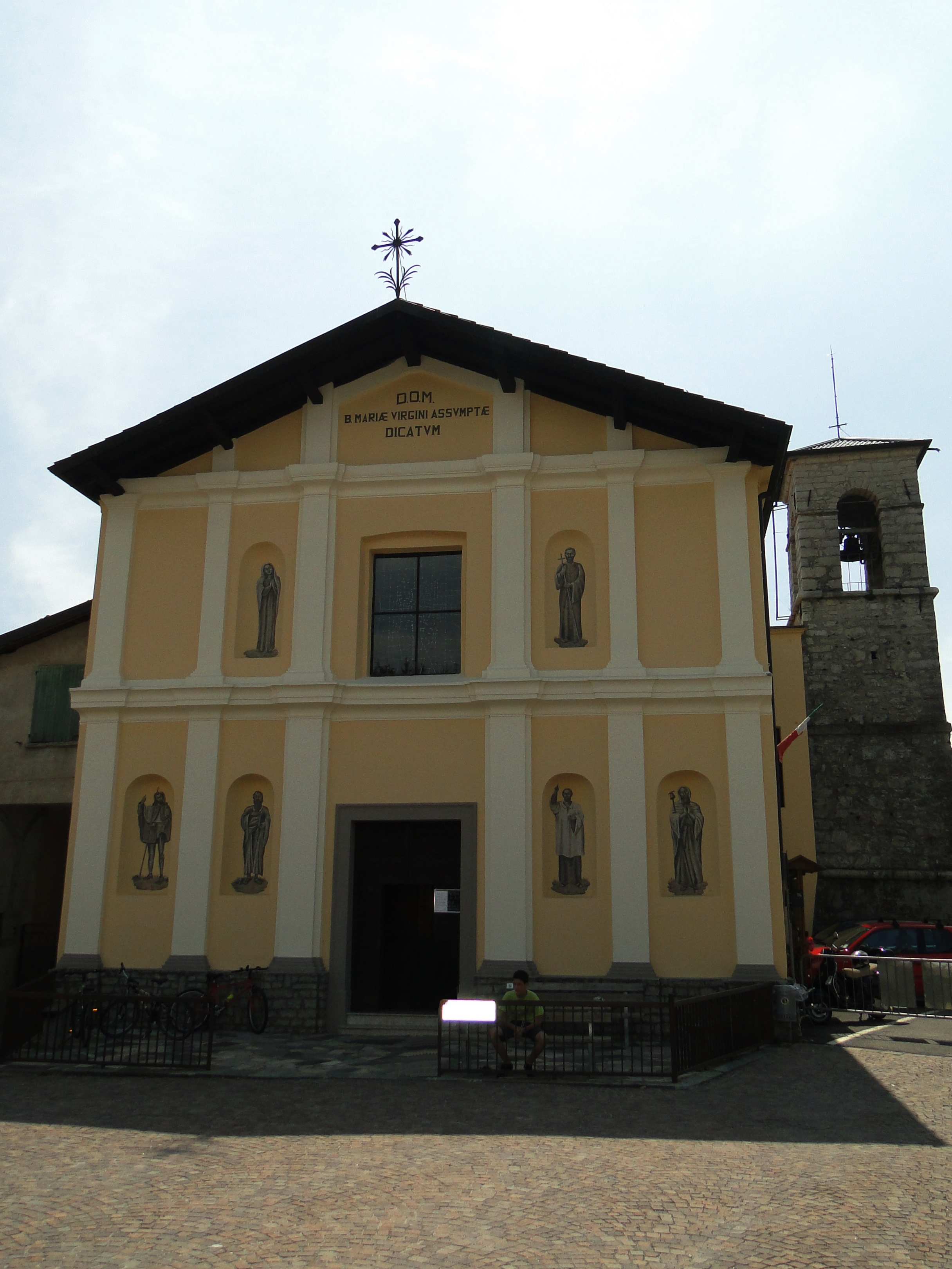 Ganda, fraz. di Aviatico (BG). Chiesa di Santa Maria Assunta